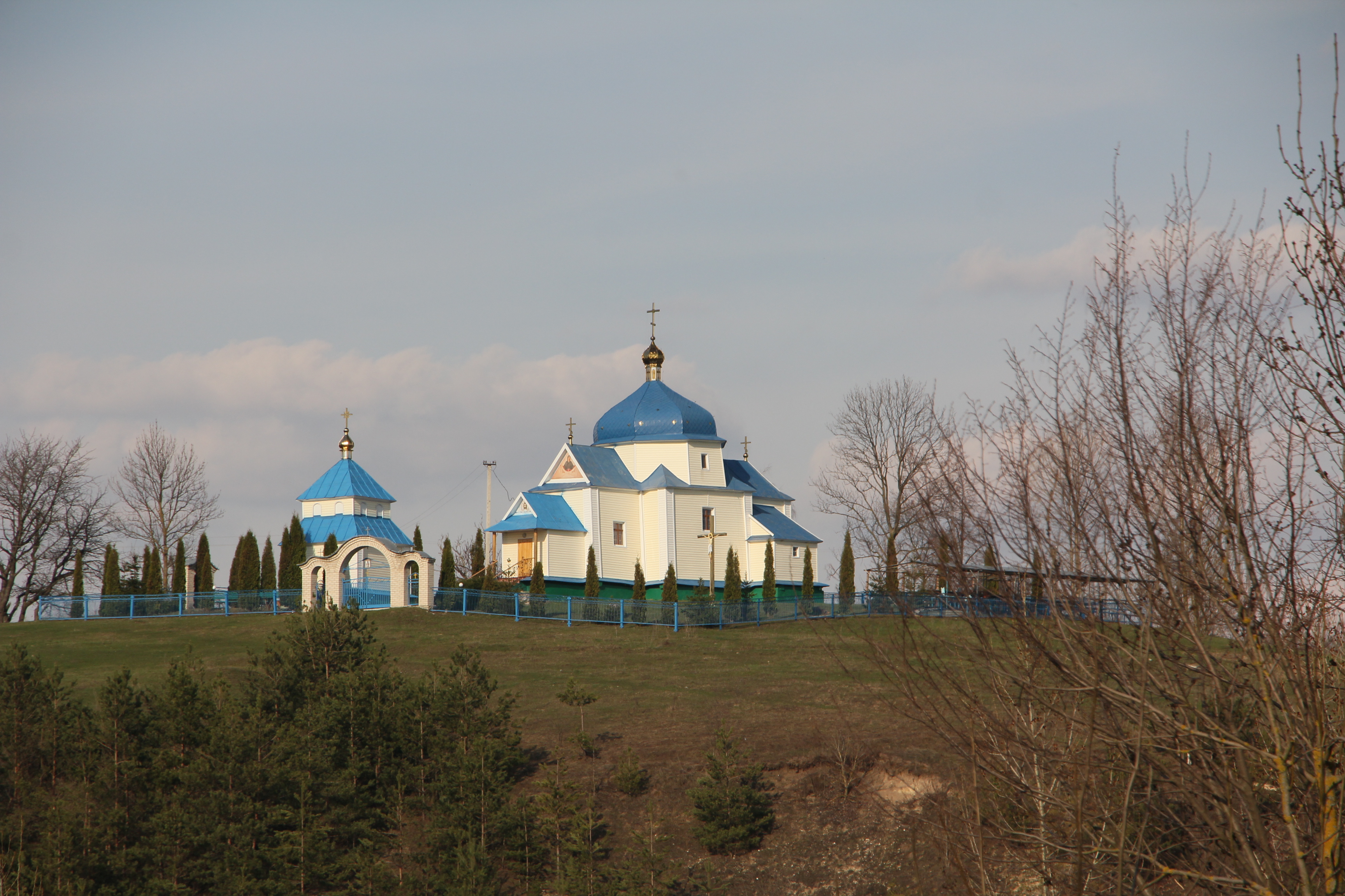 Дерев'яна церква в селі Іванківці Лановецького району, Тернопільської області